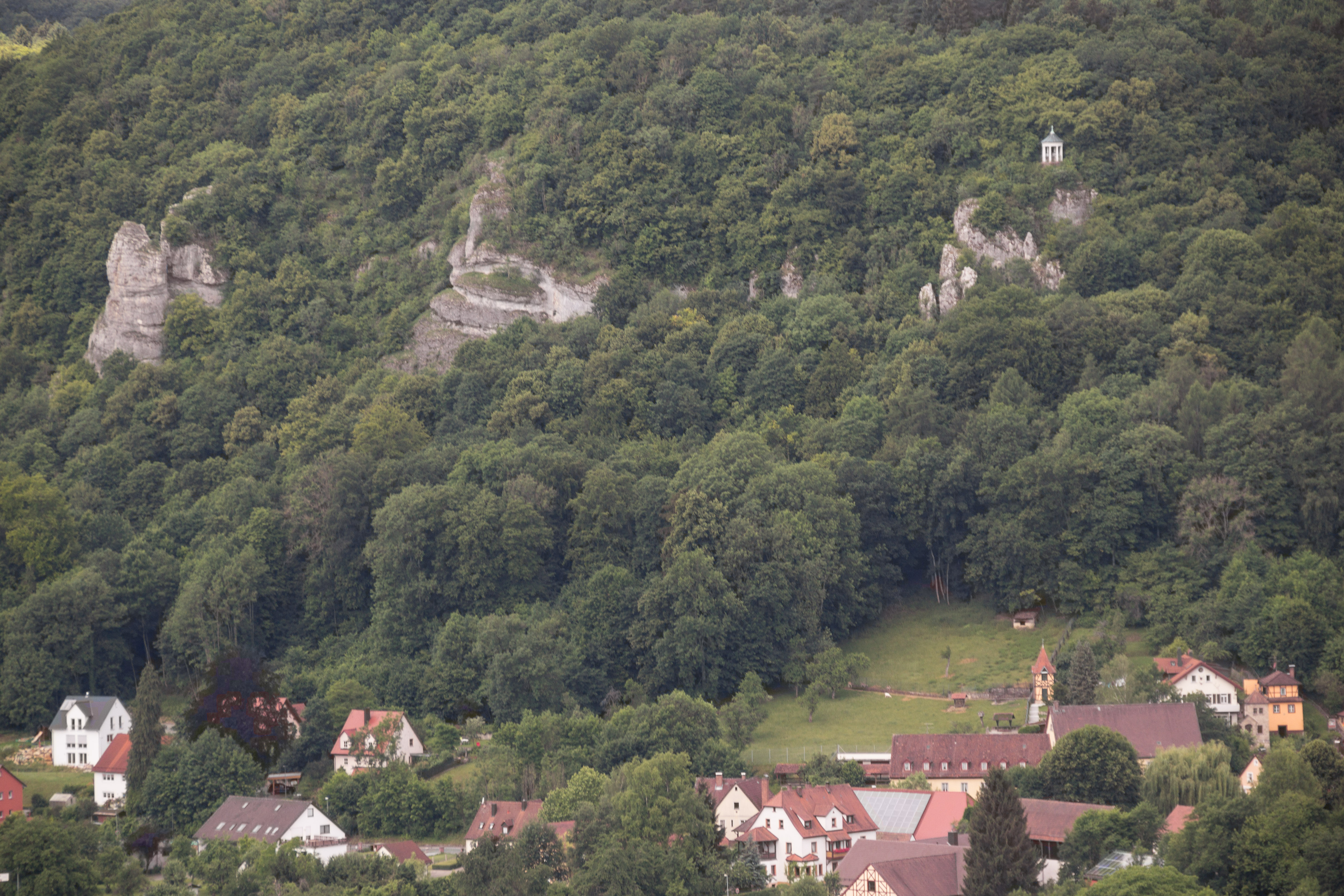 Geotop Kalkfelsen am Hummerberg (474R019), Naturpark und Landschaftsschutzgebiet Fränkische Schweiz-Veldensteiner Forst, Streitberg